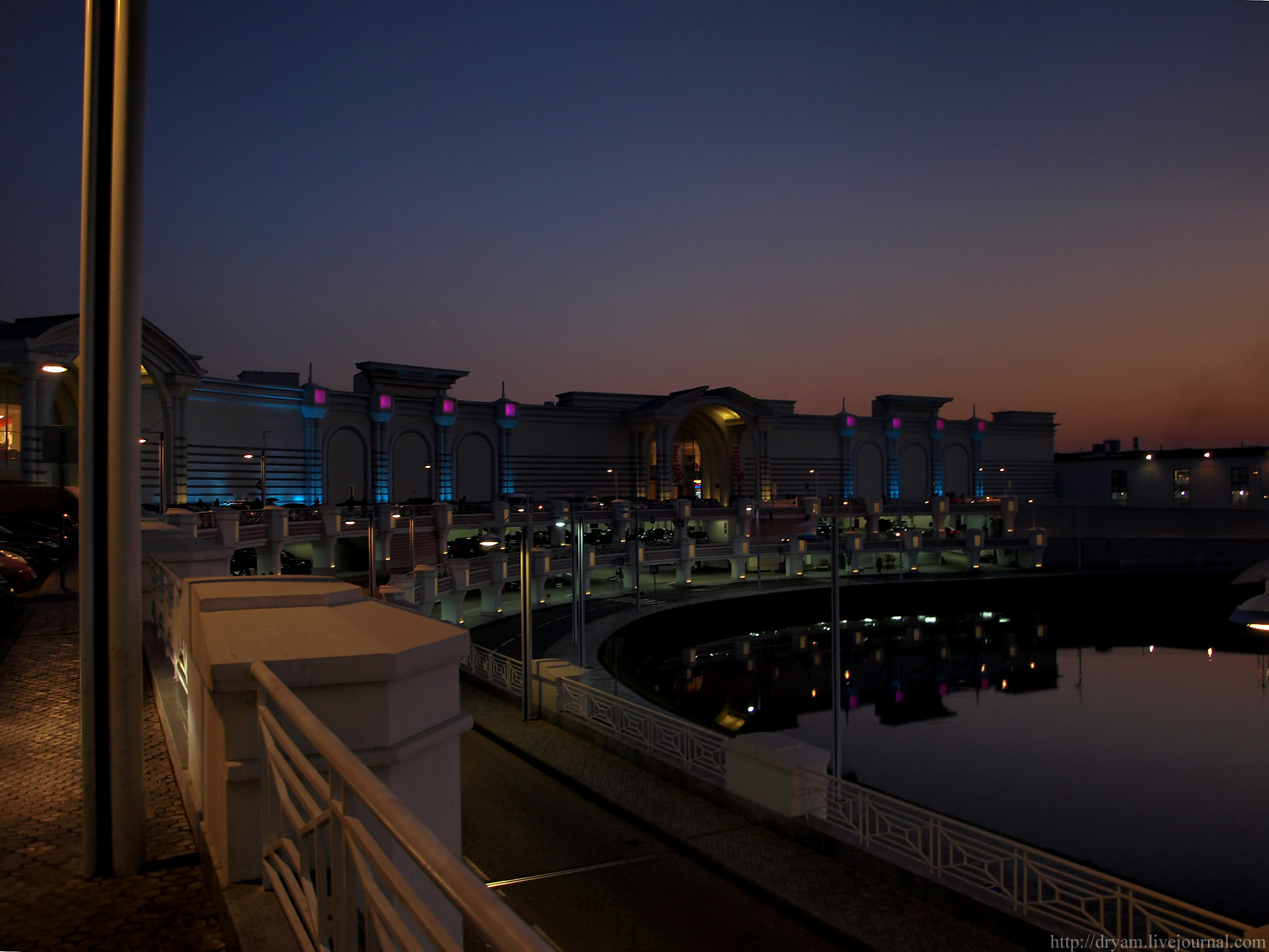 ТЦ Вегас, вечер